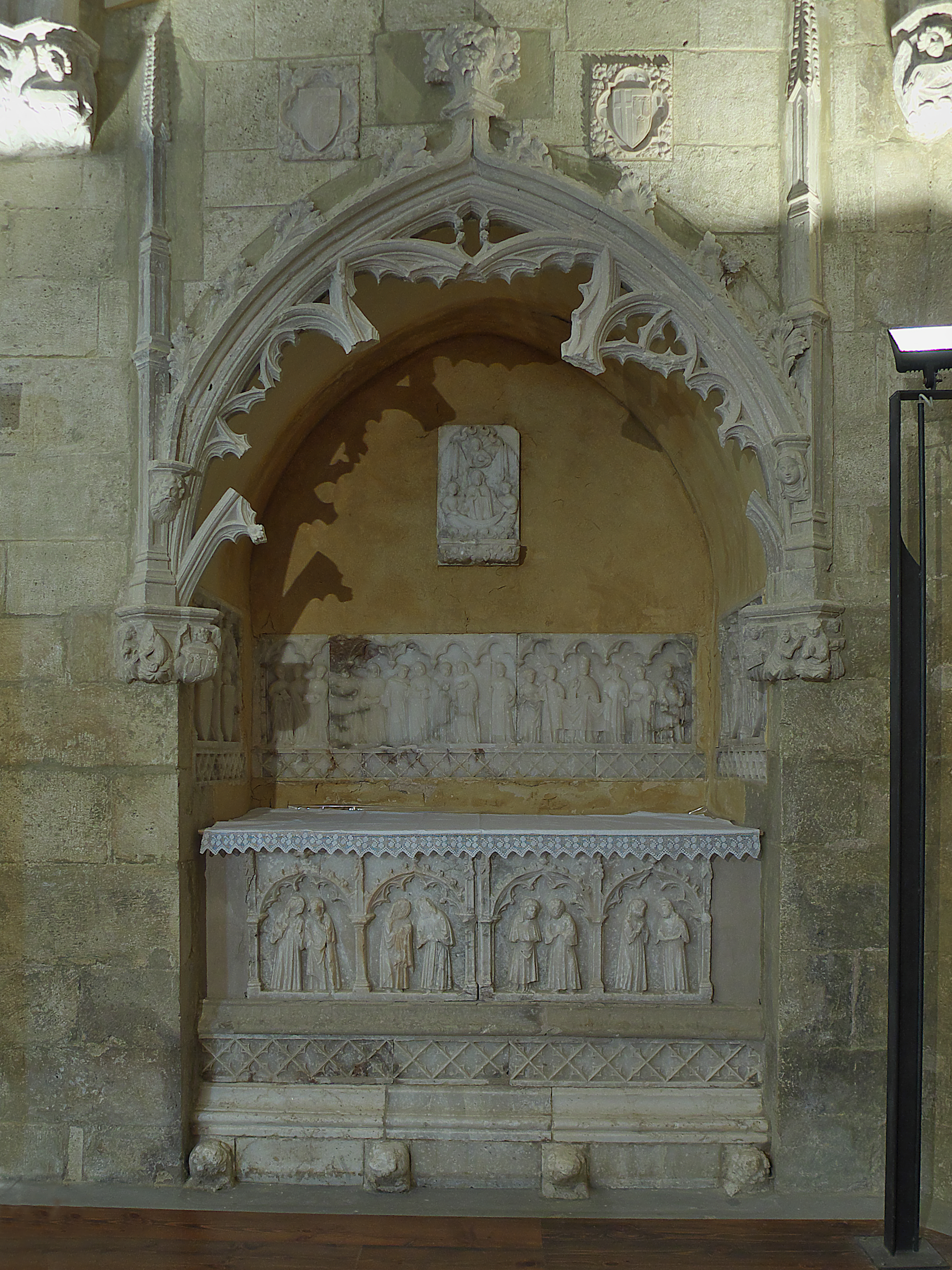 Iglesia de San Miguel, Cantavieja. Sepulcro de alabastro, taller de Pere Moragues, del Castellán de Amposta (1417-1420), Gonzalo de Funes (†1420), Comendador de Cantavieja, de la Orden Hospitalaria de San Juan de Jerusalén y patrono de la Iglesia de San Miguel de Cantavieja. El interesante sepulcro (ca. 1415) sufrió pérdidas y deterioro, principalmente durante la Guerra Civil española.